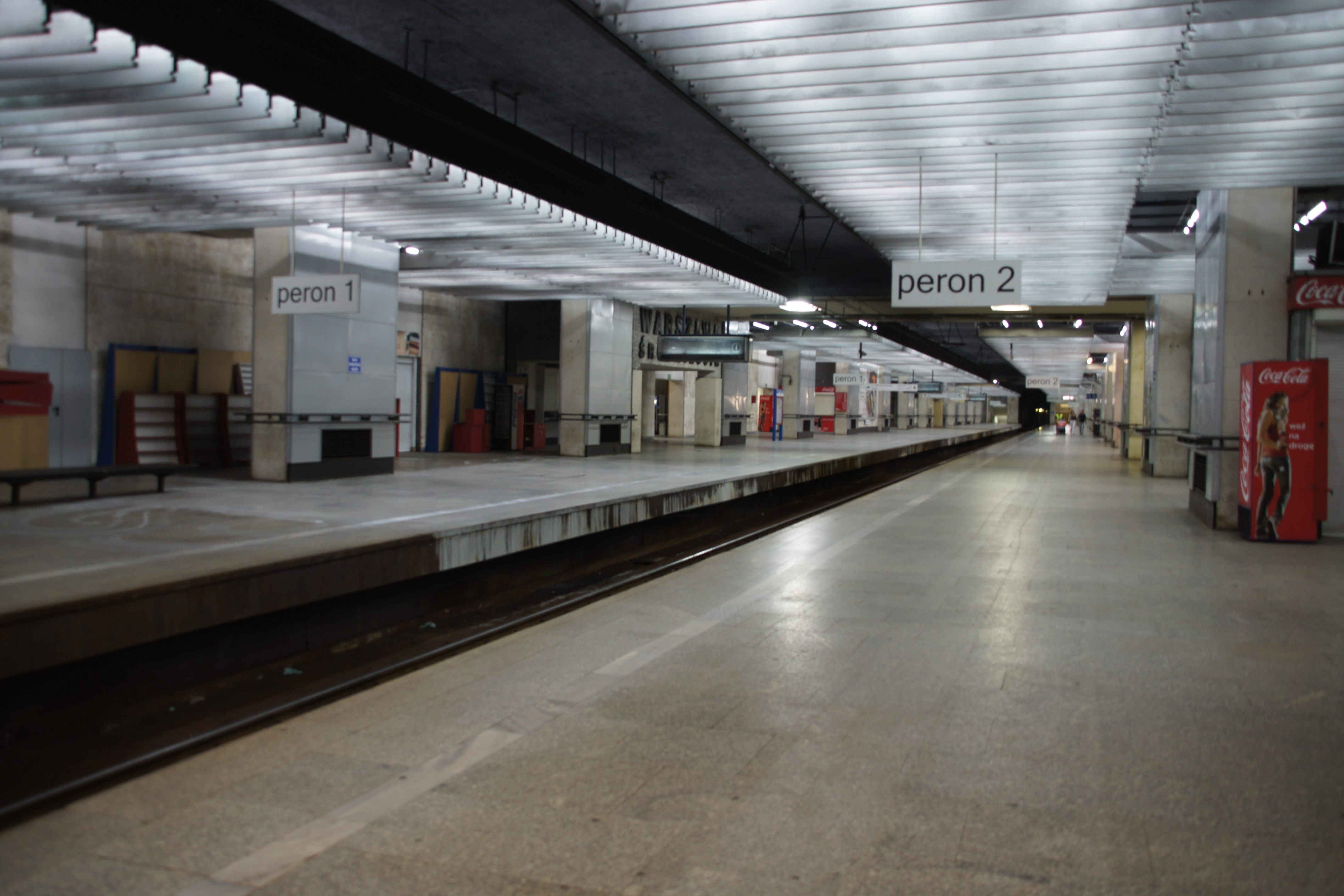 Dworzec Warszawa Śródmieście - zamknięty w czasie remontu fragmentu Linii Średnicowej